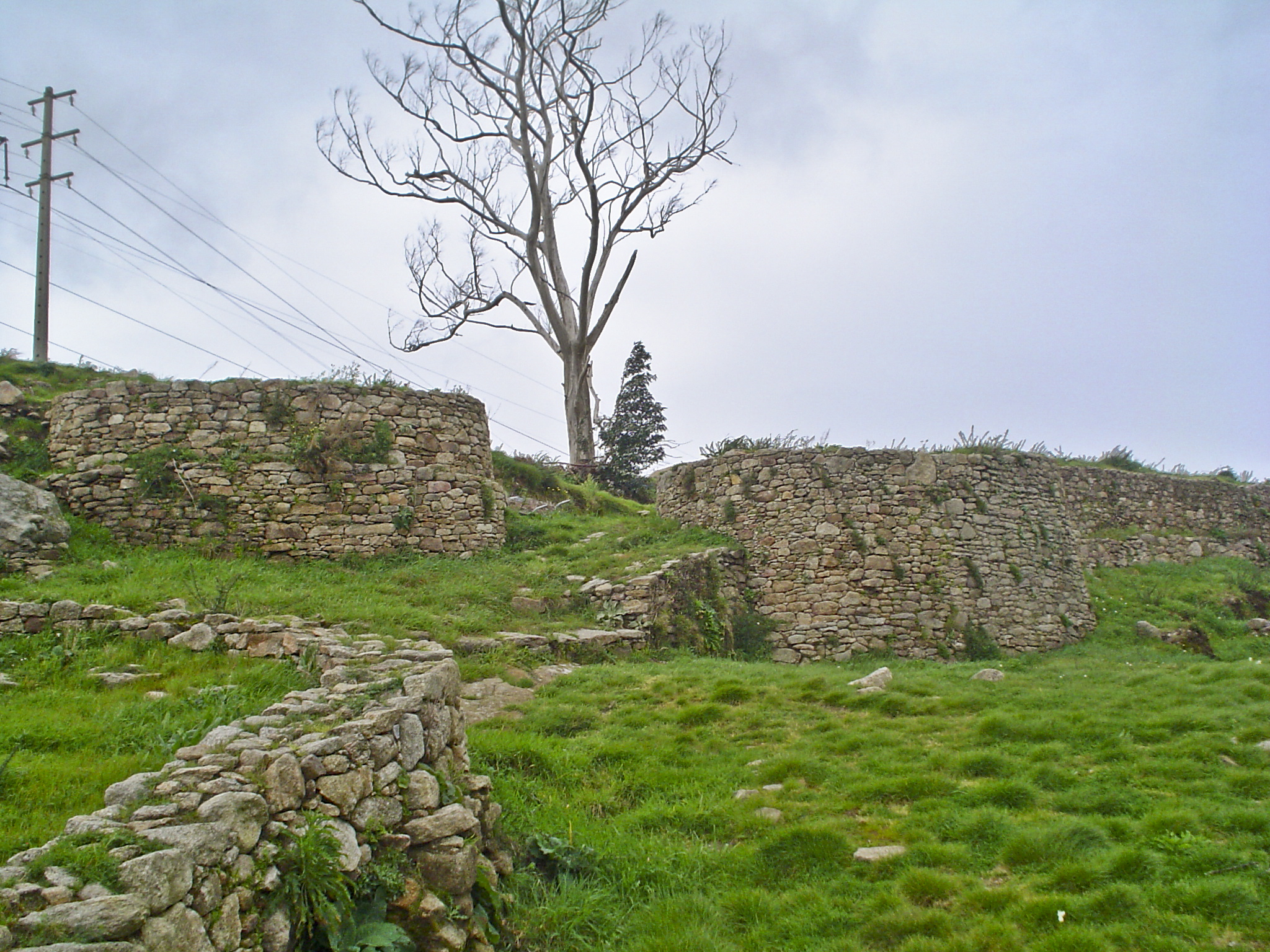 Castro de Elviña. Aceso oposto a croa